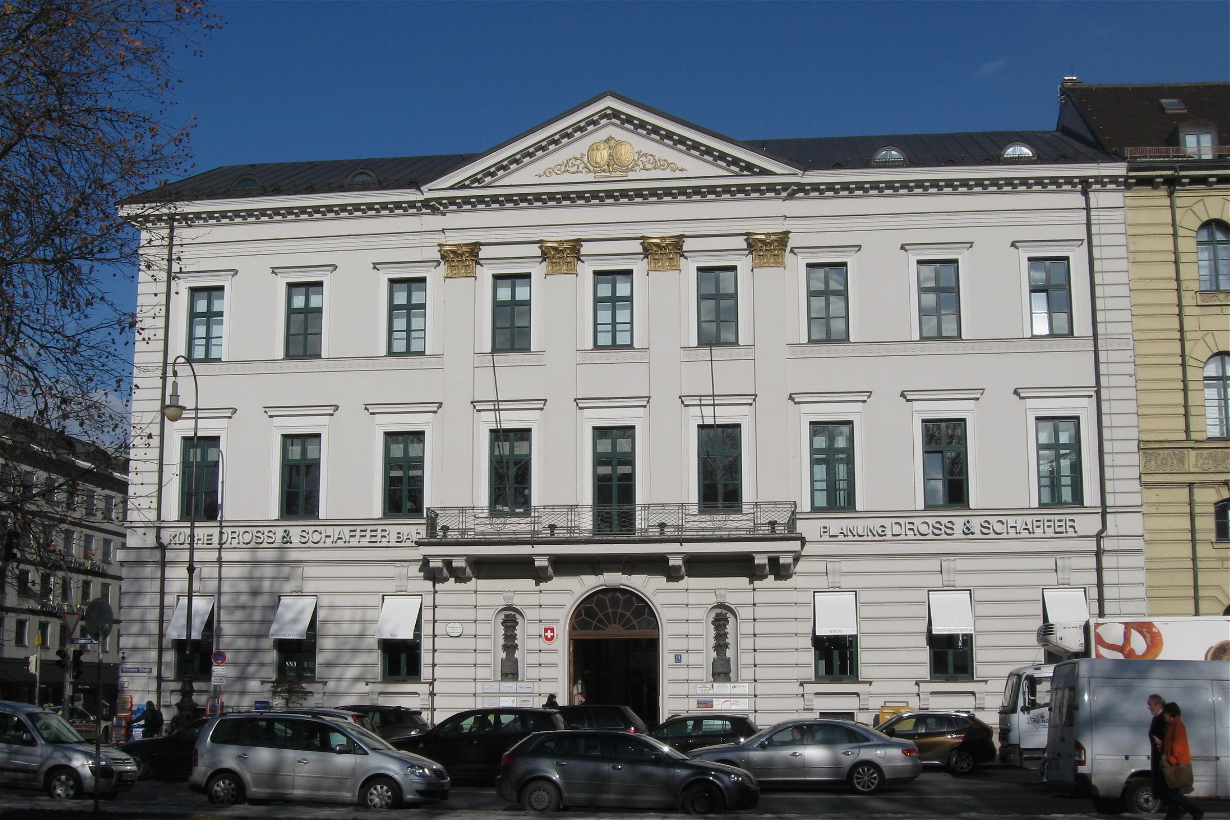 Brienner Straße 14; Ehem. Palais Bayrstorff (später Almeida), repräsentativer klassizistischer Bau, 1824/25 von Jean Baptiste Métivier